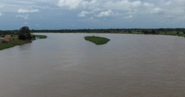 Via a San Juan de Payara Estado Apure